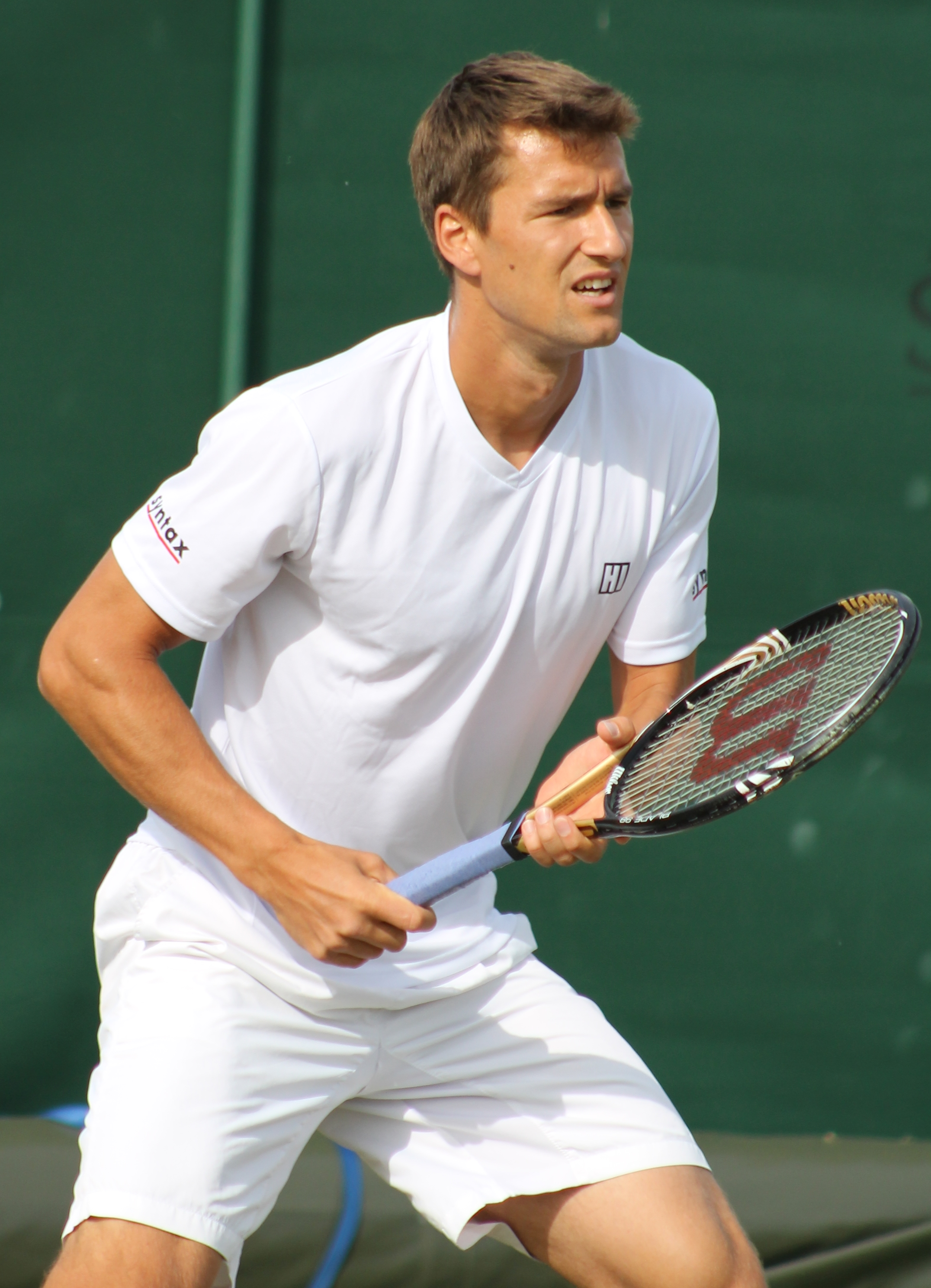 Chiudinelli WMQ14 (4)